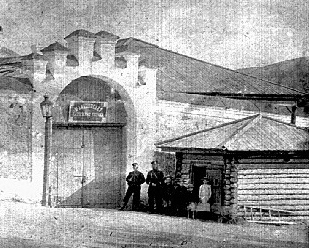 Maljcevskaja women prison in Nerchzinsk, EastSiberia, Russia, 1910.